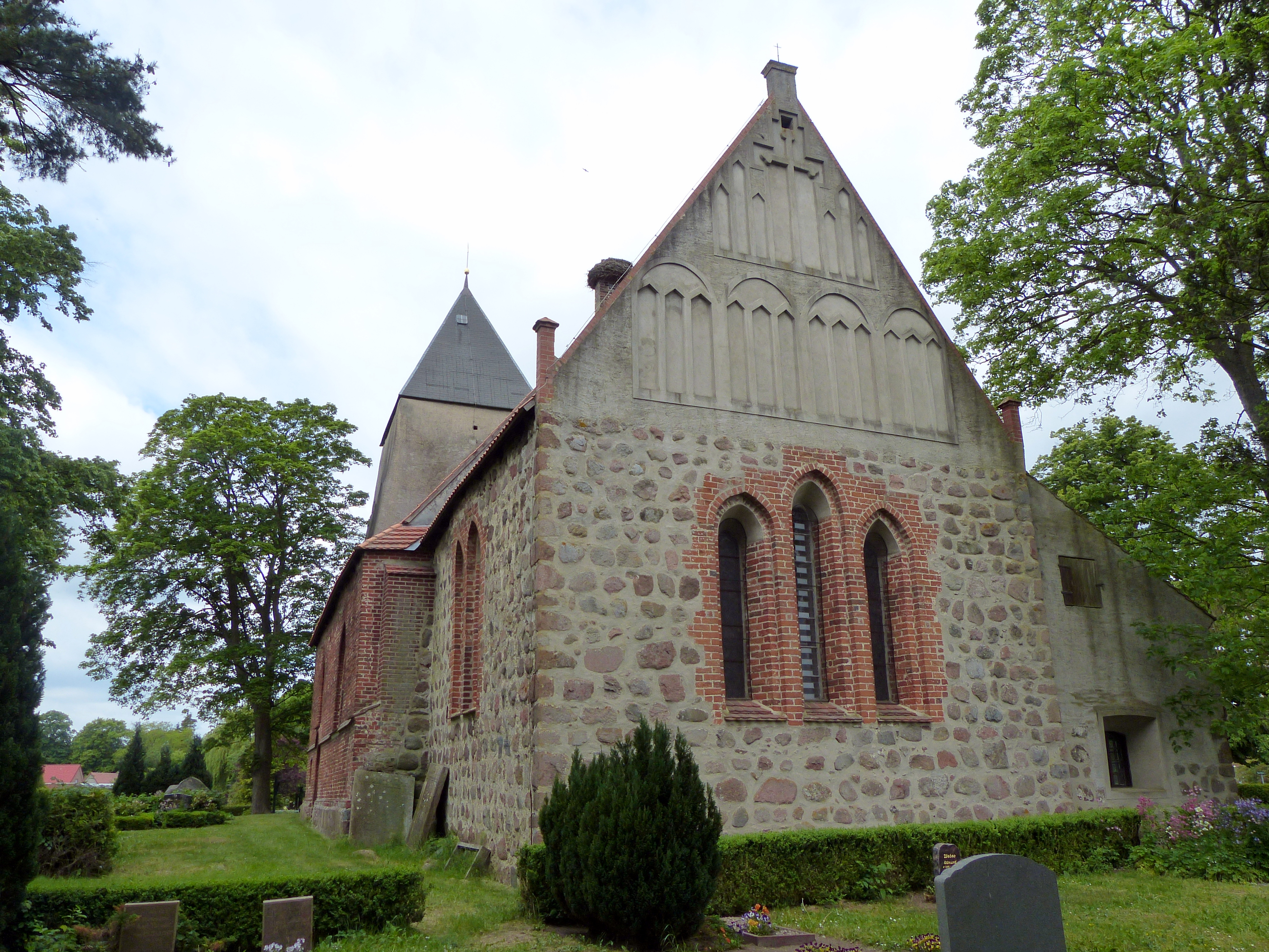 Rakow (Klein Rakow), Süderholz, Kirche, Ostgiebel, Teil der Südseite